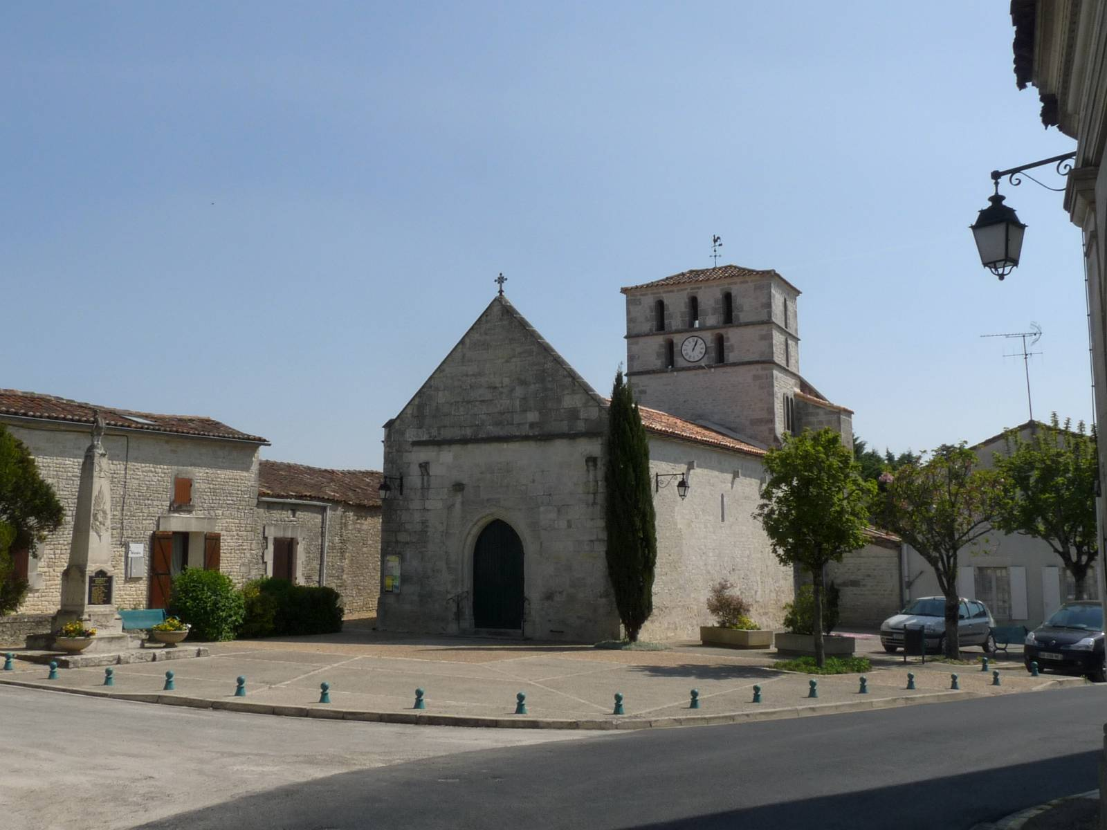 Eglise de Réparsac, Charente, France